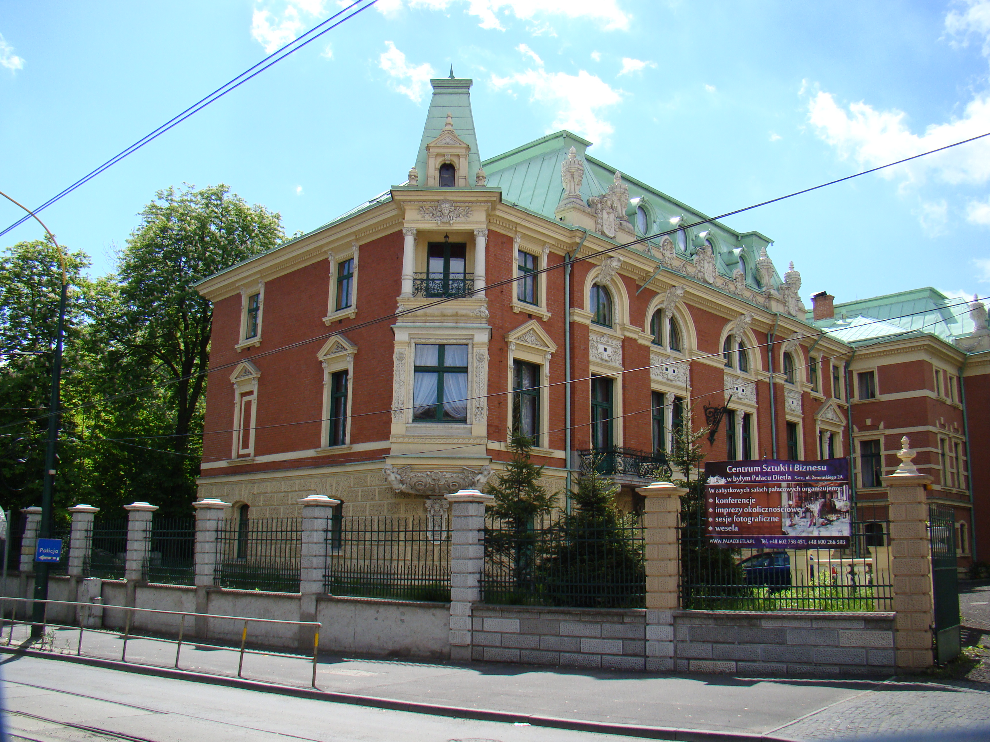 Sosnowiec, pałac Dietlów, 2 poł. XIX